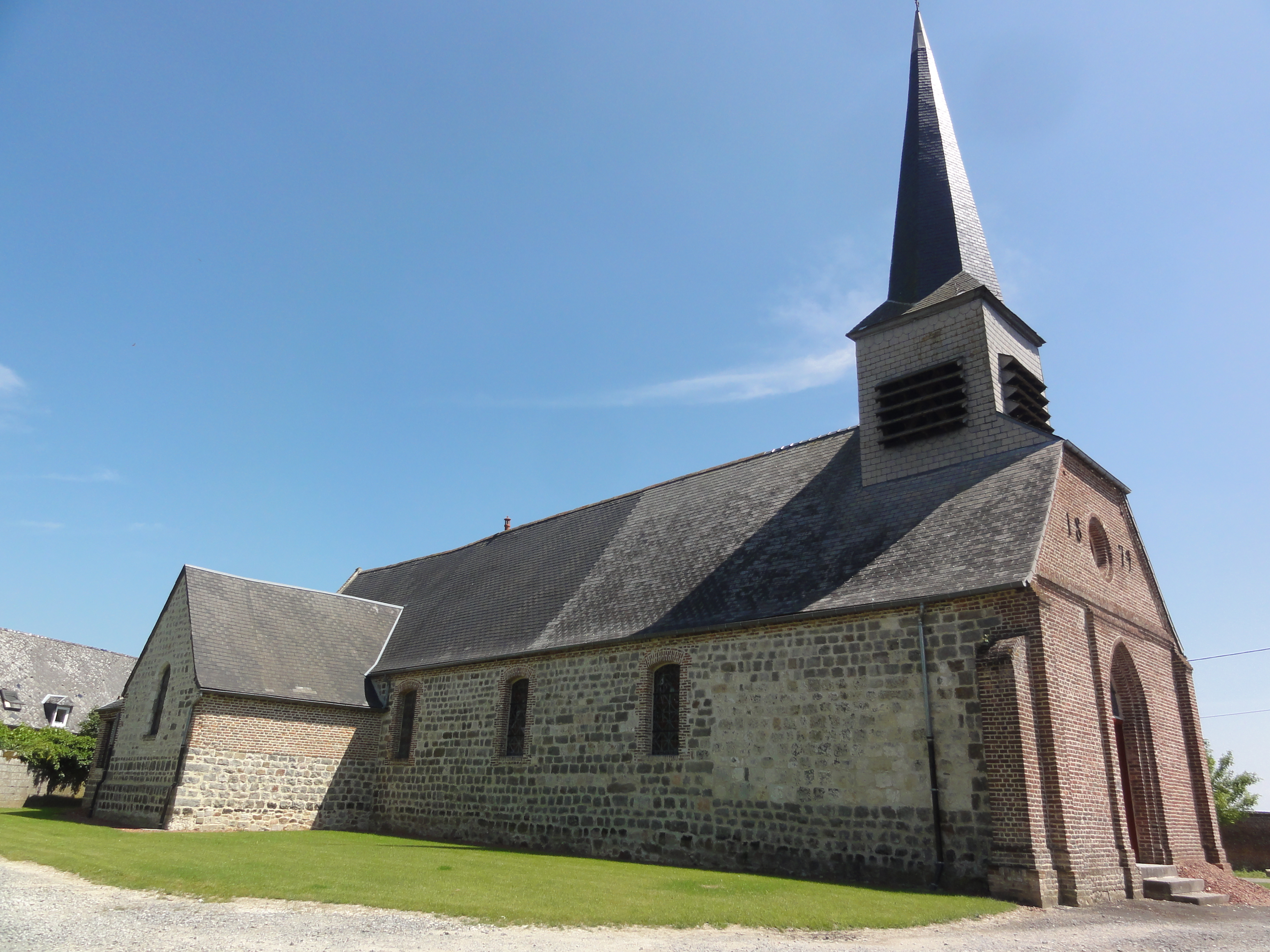 Sons-et-Ronchères (Aisne) église